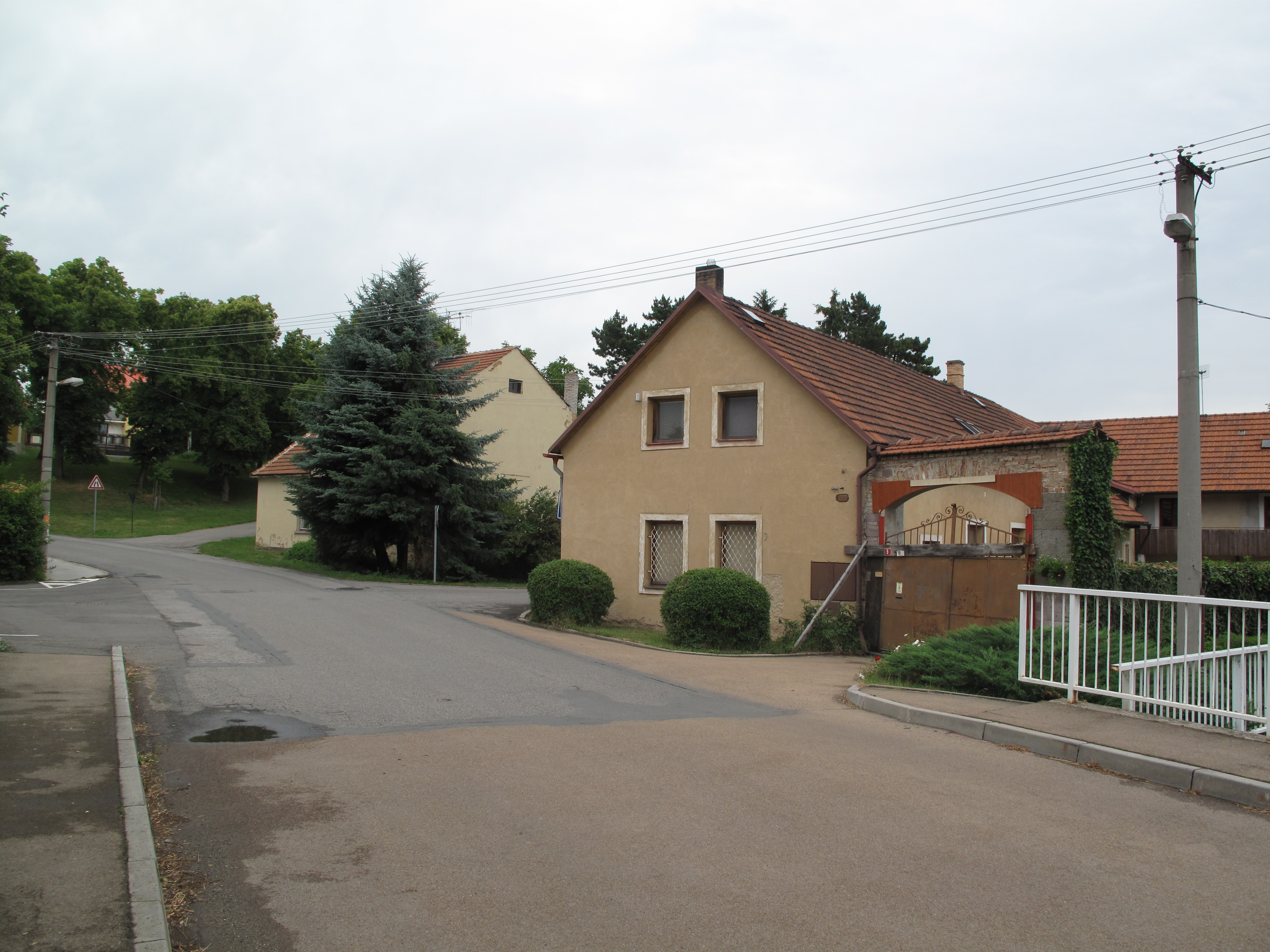 Běloky